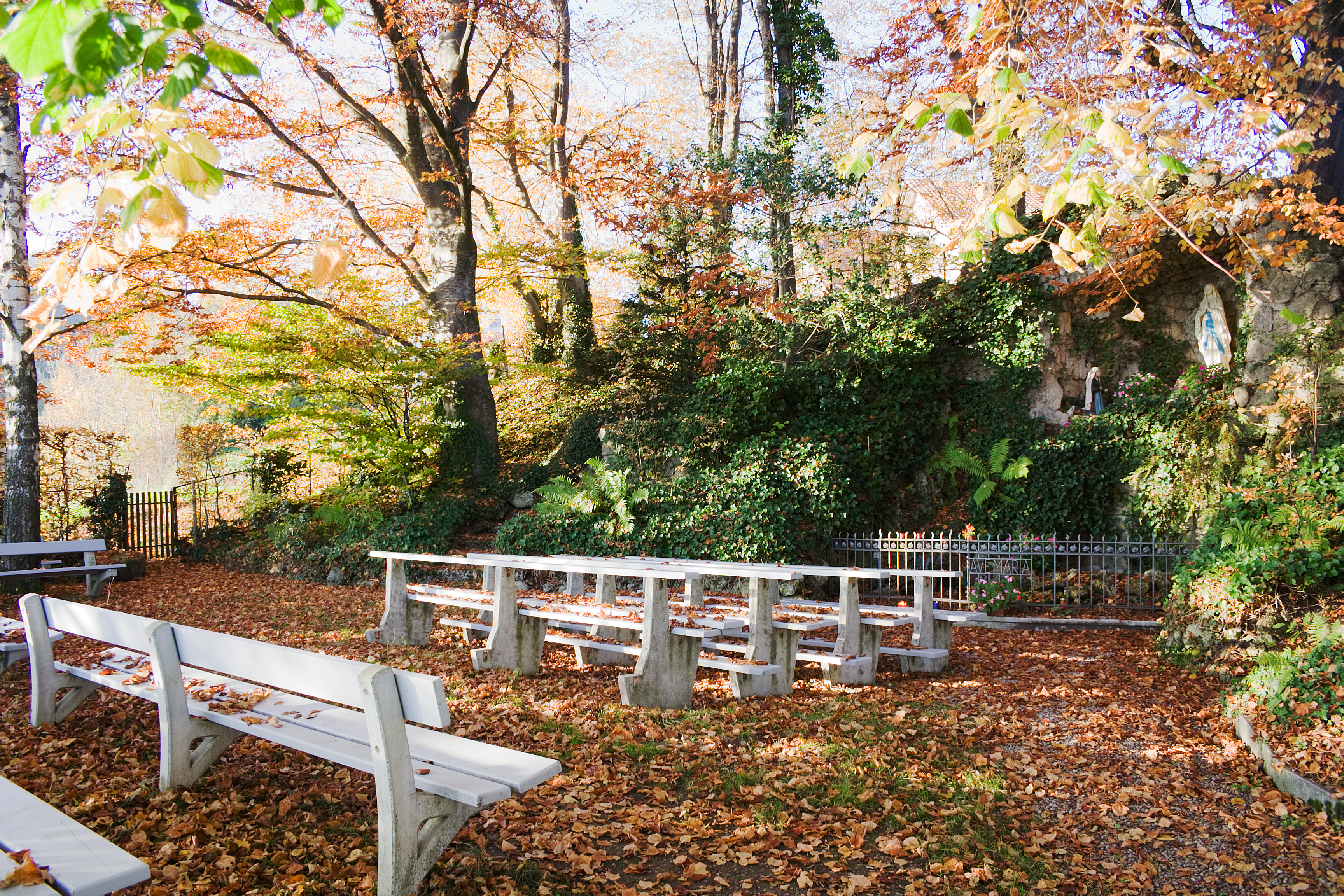 Grotte unterhalb von Schloss Zuckenriet, Gemeinde Niederhelfenschwil, Schweiz